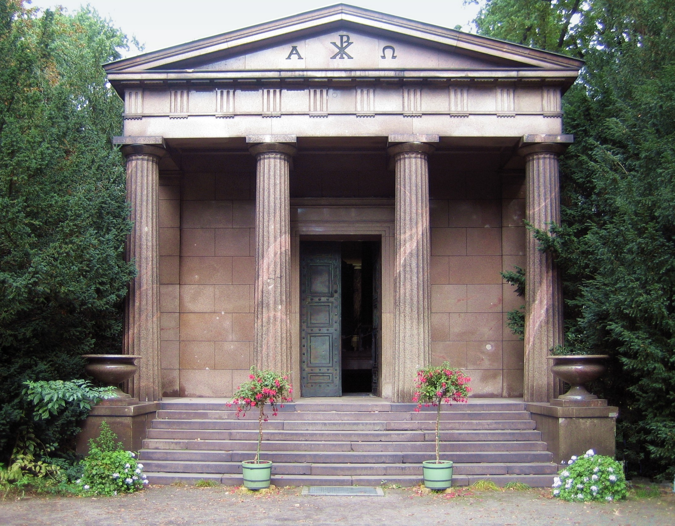 Berlin, Mausoleum im Schlosspark Charlottenburg.